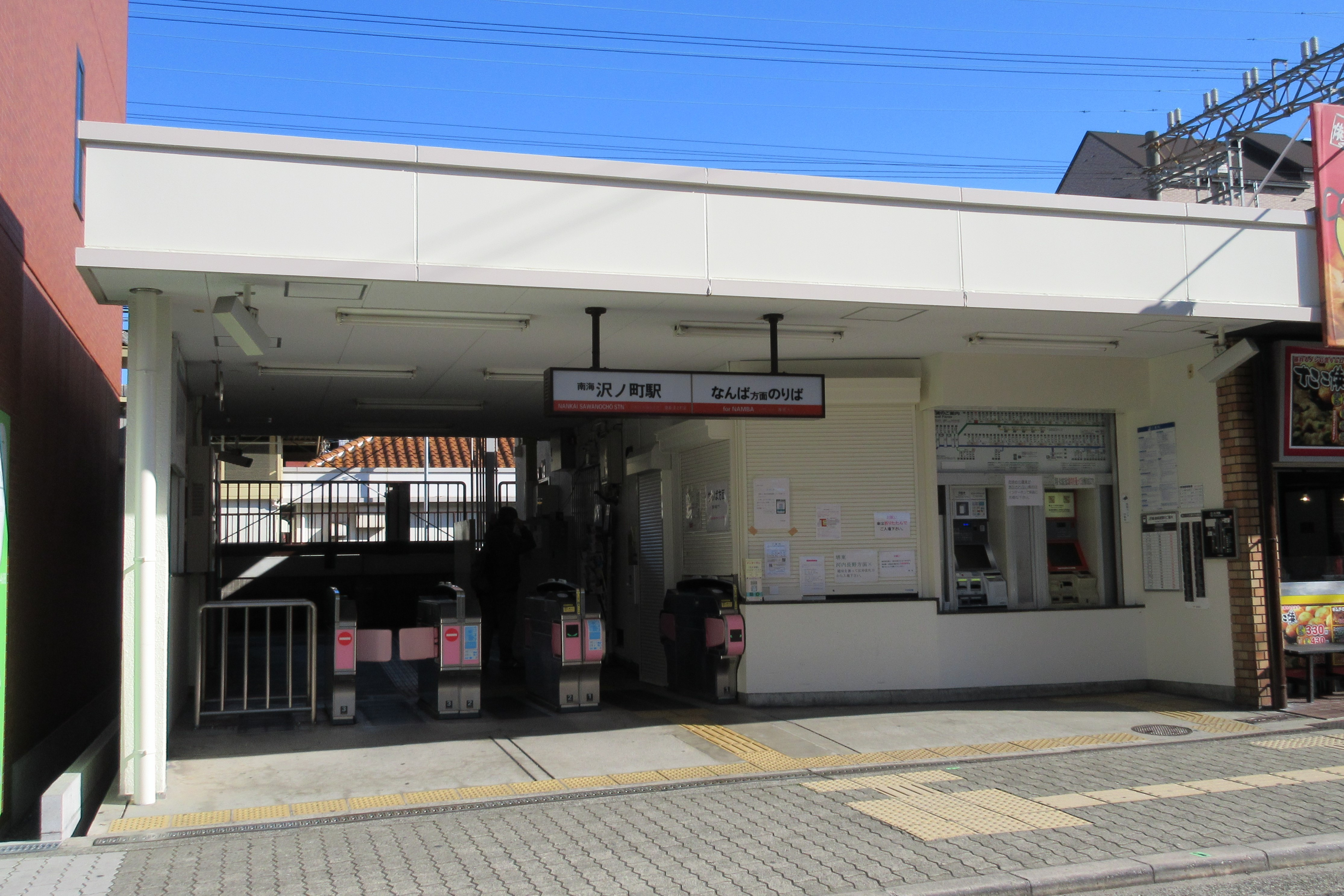 南海電鉄沢ノ町駅